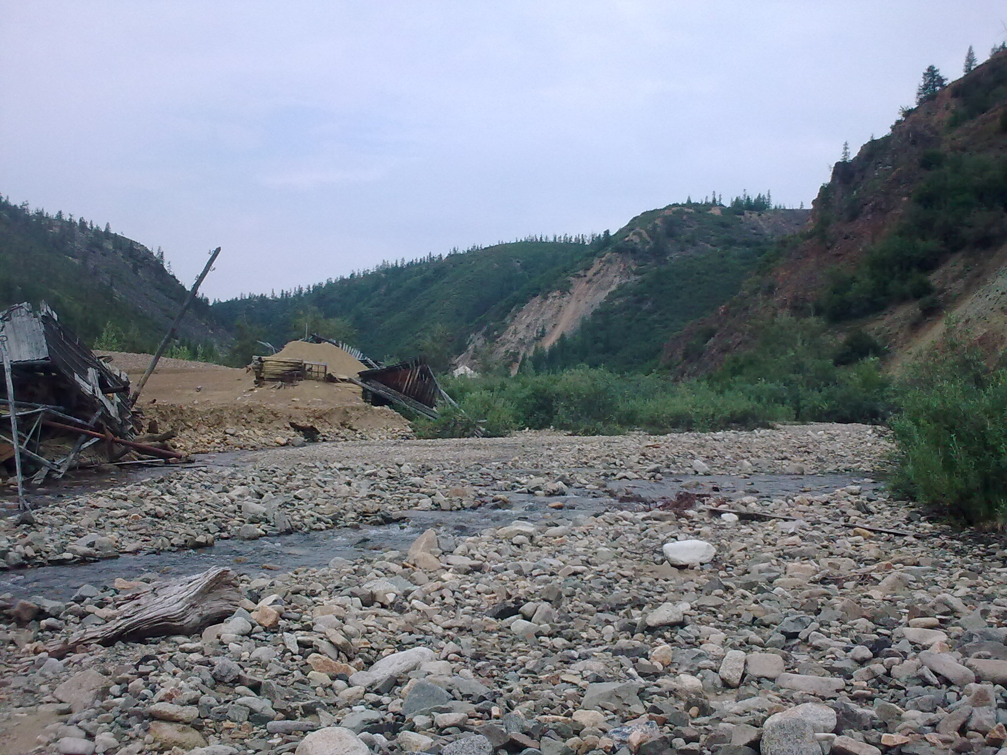 Бывший поселок Труд, оловянный рудник